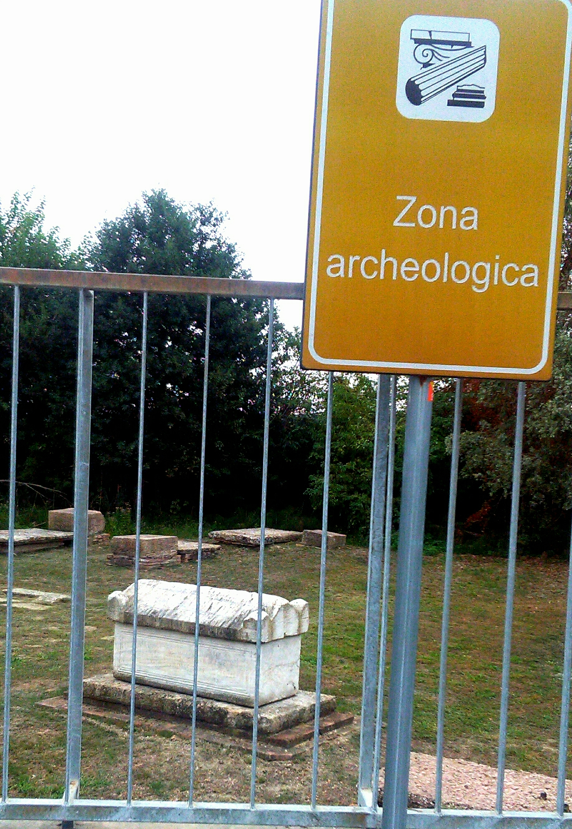 La necropoli romana di Voghenza (I-III sec. d. C.) vista da via Dante Alighieri